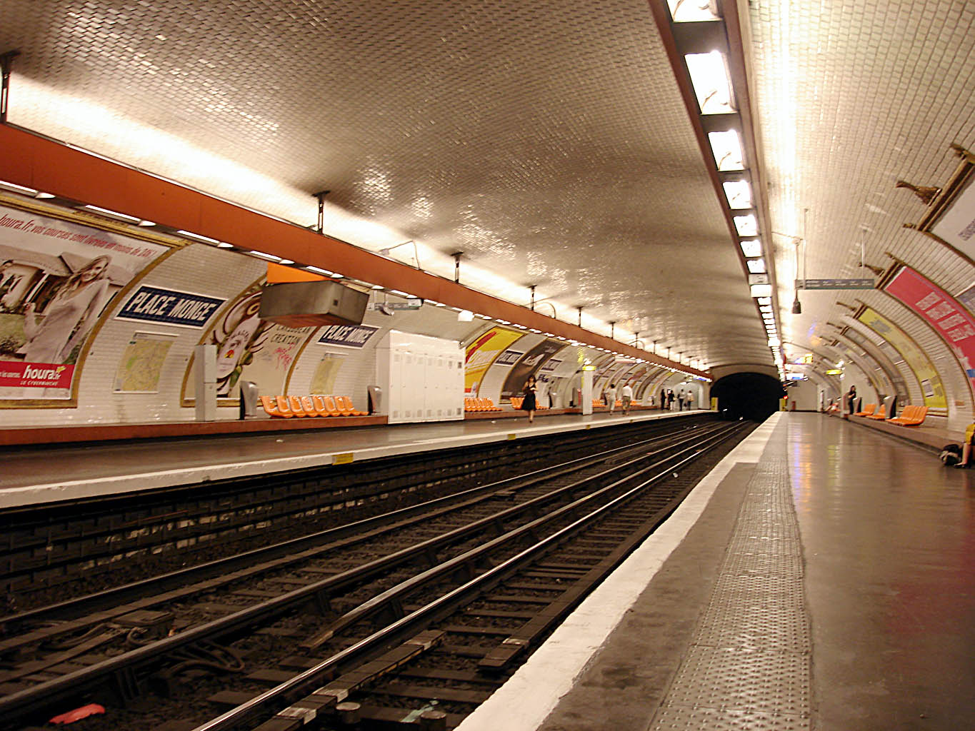 Station Place Monge, de la ligne 7 du métro de Paris, France.